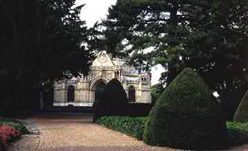 chapelle royale Saint-Louis, Dreux, Eure-et-Loir, France.